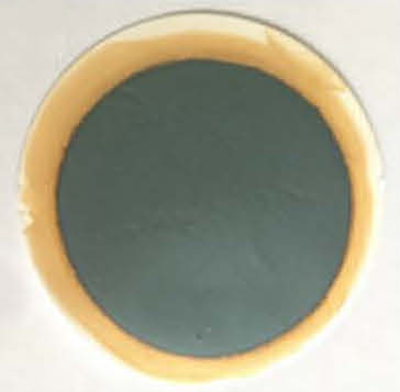 Niobium disulfide film